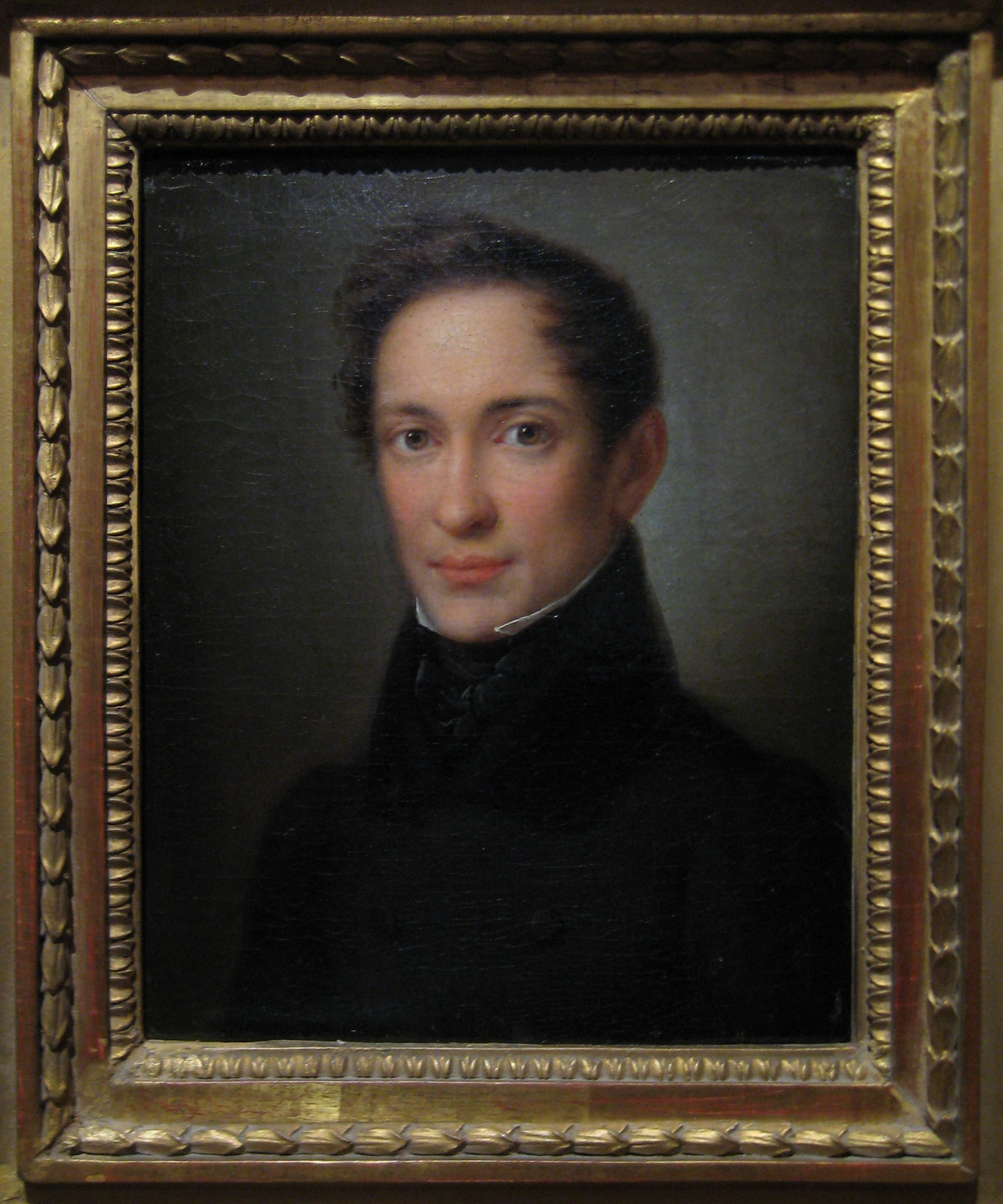 Выставка "Национальная портретная галерея", ГИМ, 2012